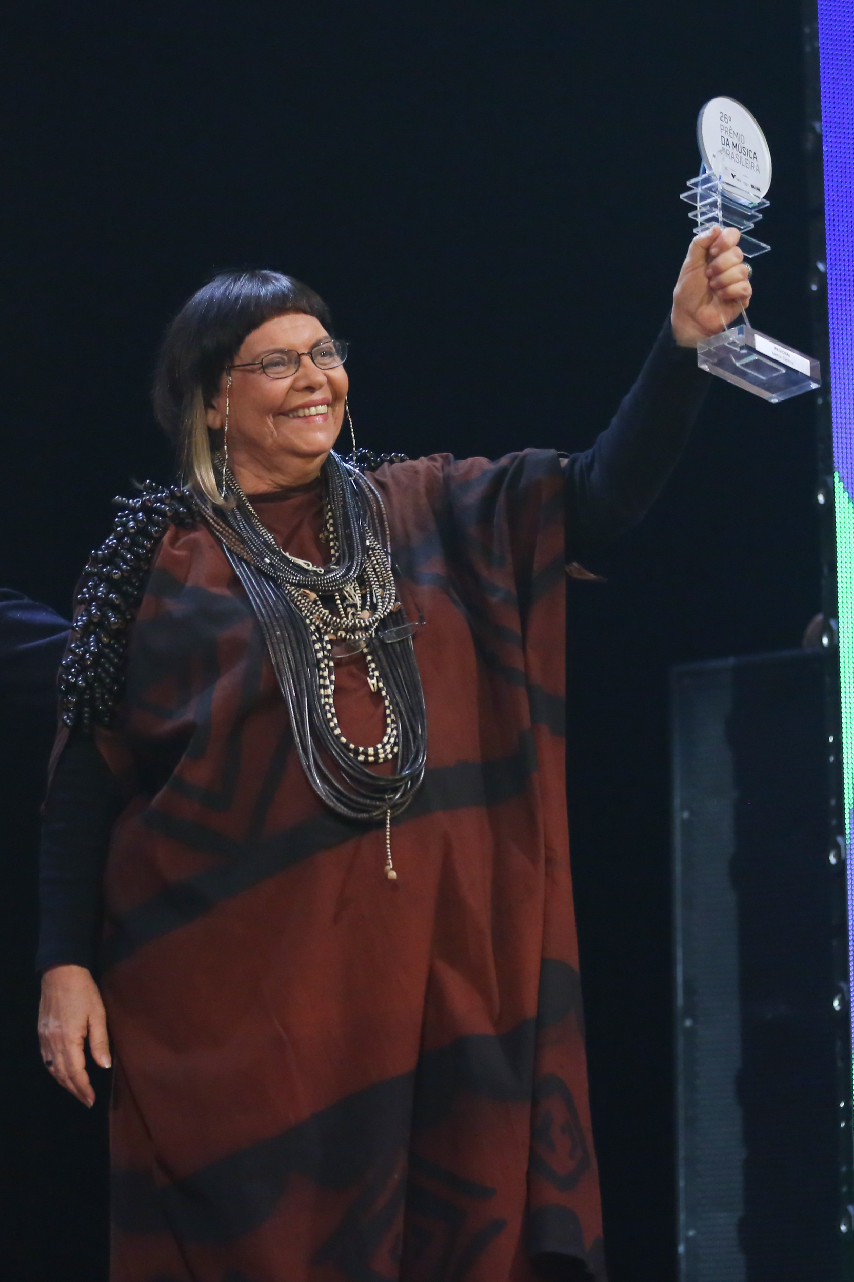 Prêmio Regional / Melhor Cantora - Marlui Miranda - 26° Prêmio da Música Brasileira 2015, no Theatro Municipal, no Centro do Rio de Janeiro/RJ. (10/06/15) Foto: Roberto Filho/Divulgacão